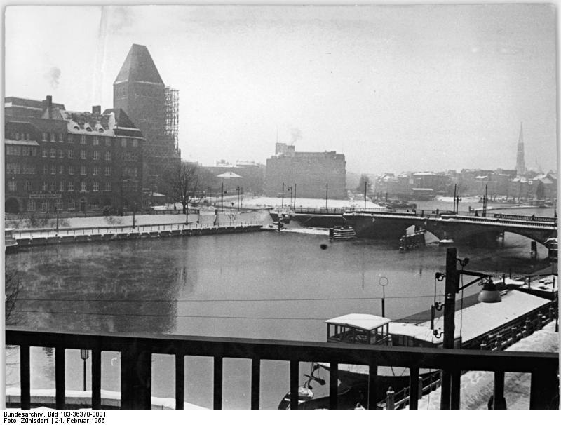 Berlin, Jannowitzbrücke, Lastkahn, Winter Zentralbild Zühlsdorf 24.2.1956 Wintertag 1956 in Berlin. Grauer Morgen an der Jannowitzbrücke. Anmerkung: Blick von der Jannowitzbrücke zur Waisenbrücke. Links das Märkisches Museum. Information added by Wikimedia users.